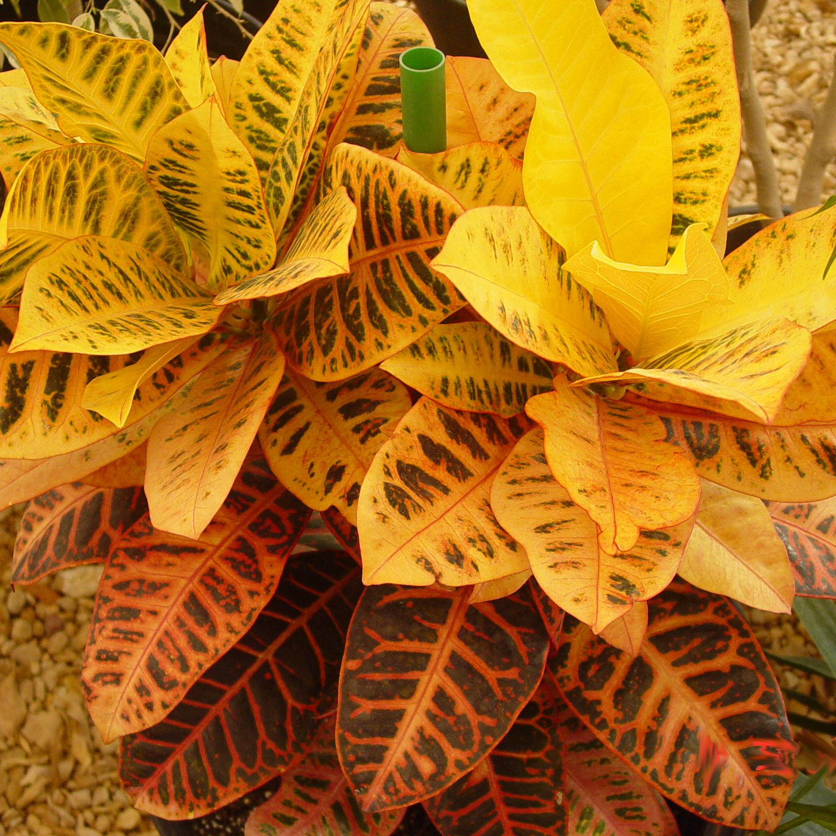 അലങ്കാരച്ചെടികൾ‌ എന്ന താളിനു വേണ്ടി